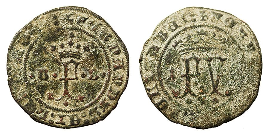 Moneda de dos morabatins encunyada a Burgos per al seu ús a Santo Domingo. Feta en coure, no presenta data d'emissió. Al revers mostra les lletres FY entre herminis, inicials dels Reis Catòlics.